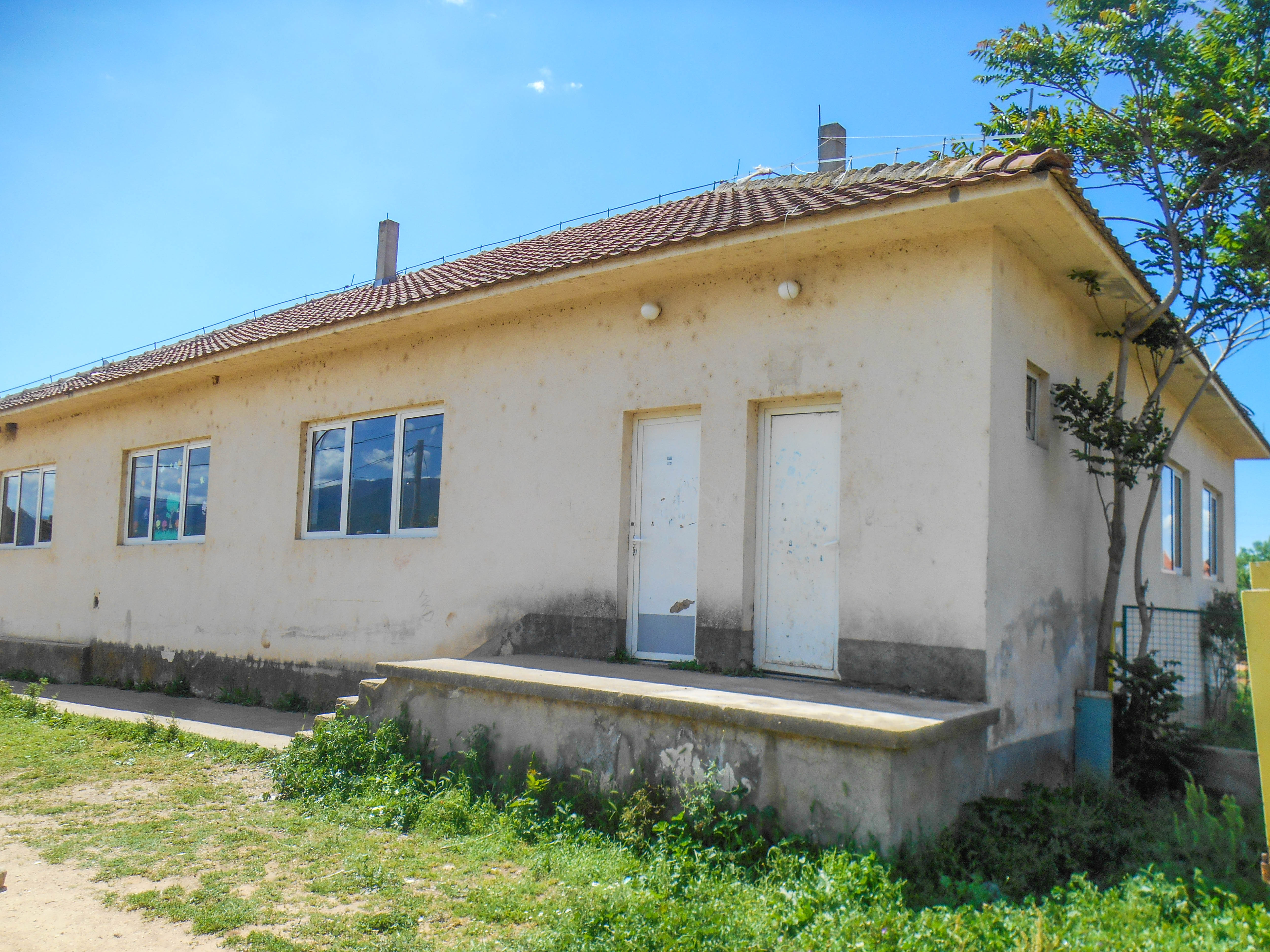 Основно училиште „Атанас Нивичански“ - Доброшинци